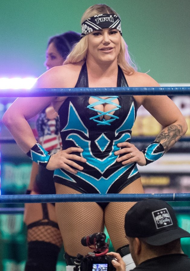 La catcheuse Taya Valkyrie entrant sur le ring avant un combat en 2018.